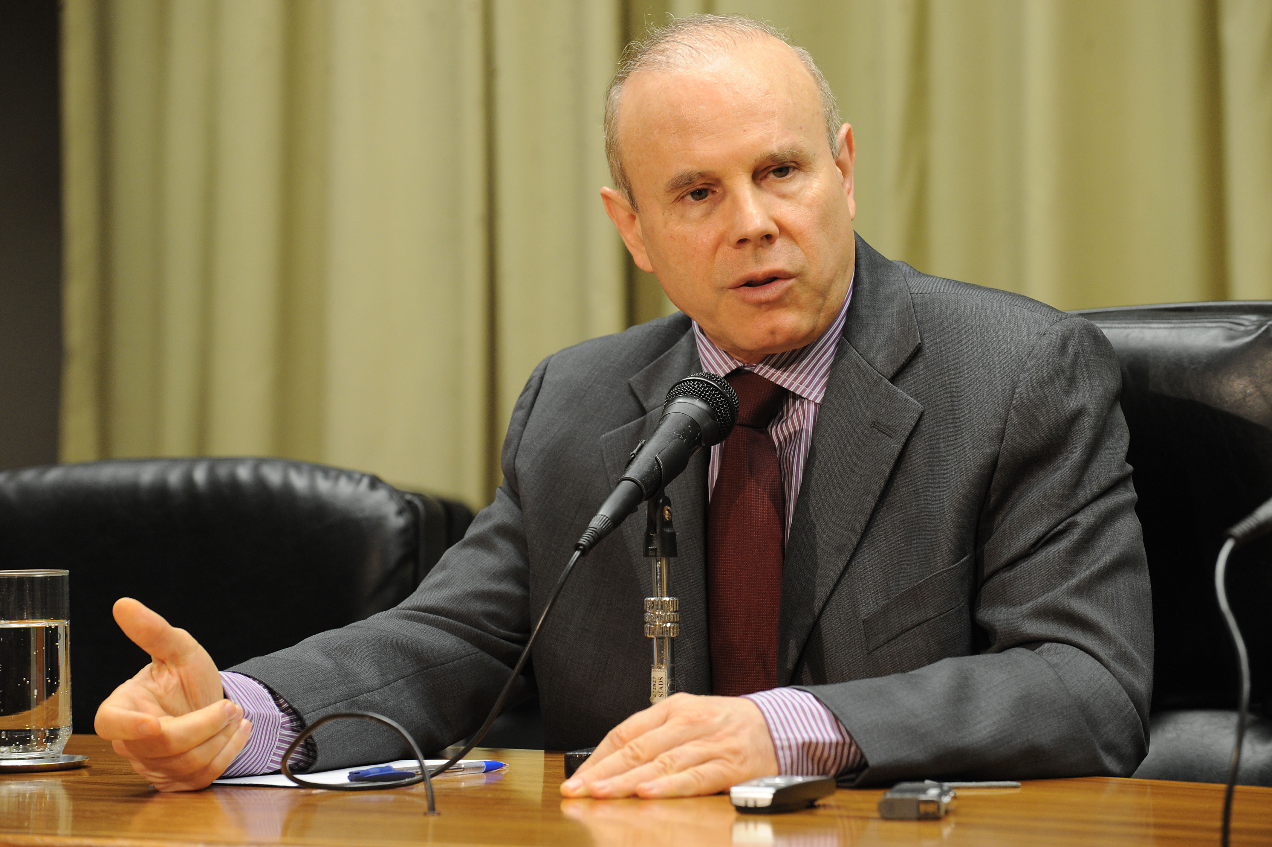 O ministro da Fazenda, Guido Mantega, disse que o Brasil emprestará US$ 10 bilhões ao Fundo Monetário Internacional (FMI)